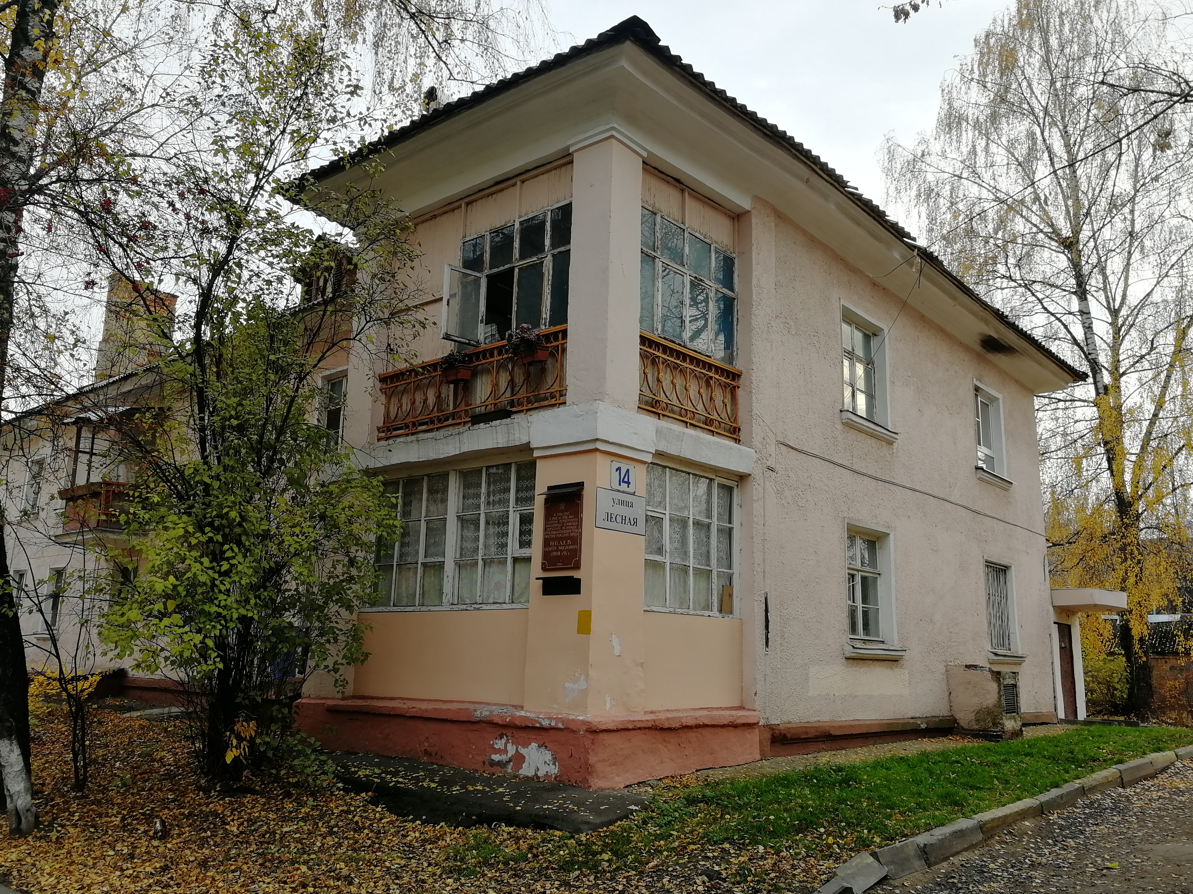 Город Королёв, улица Лесная, дом 14 - в этом доме с 1949 по 1956 год жил Исаев, Алексей Михайлович